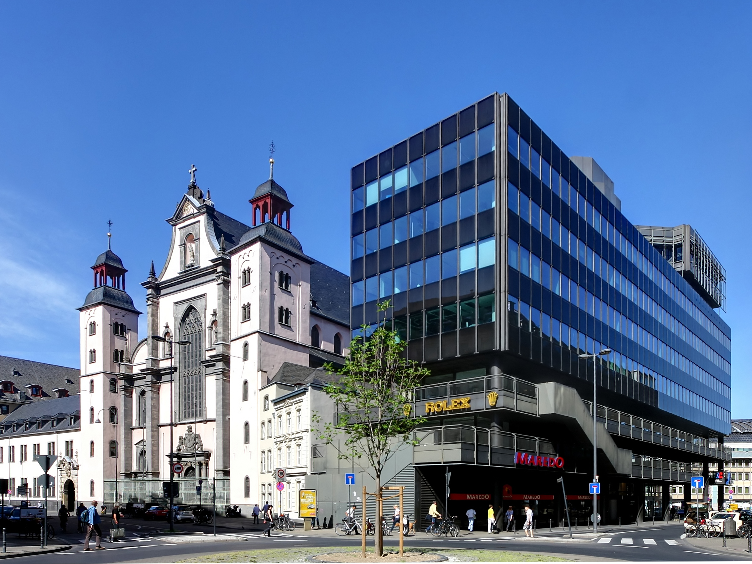 Büro- und Geschäftshaus, Dompropst-Ketzer-Straße 1-9, Köln. Architekten: Joachim Schürmann und Margot Schürmann. Baujahr: 1975-76, Bauherr: ABC Privat- und Handelsbank. Links: St. Mariä Himmelfahrt.